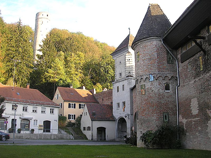 Landsberg am Lech (Oberbayern). Sandauer Tor und „Lueginsland“. Eigene Aufnahme, Okt. 2006 / Landsberg am Lech (Upper Bavaria, Germany). Sandau gate and the watchtower “Lueginsland“. Own photo, Oct. 2006